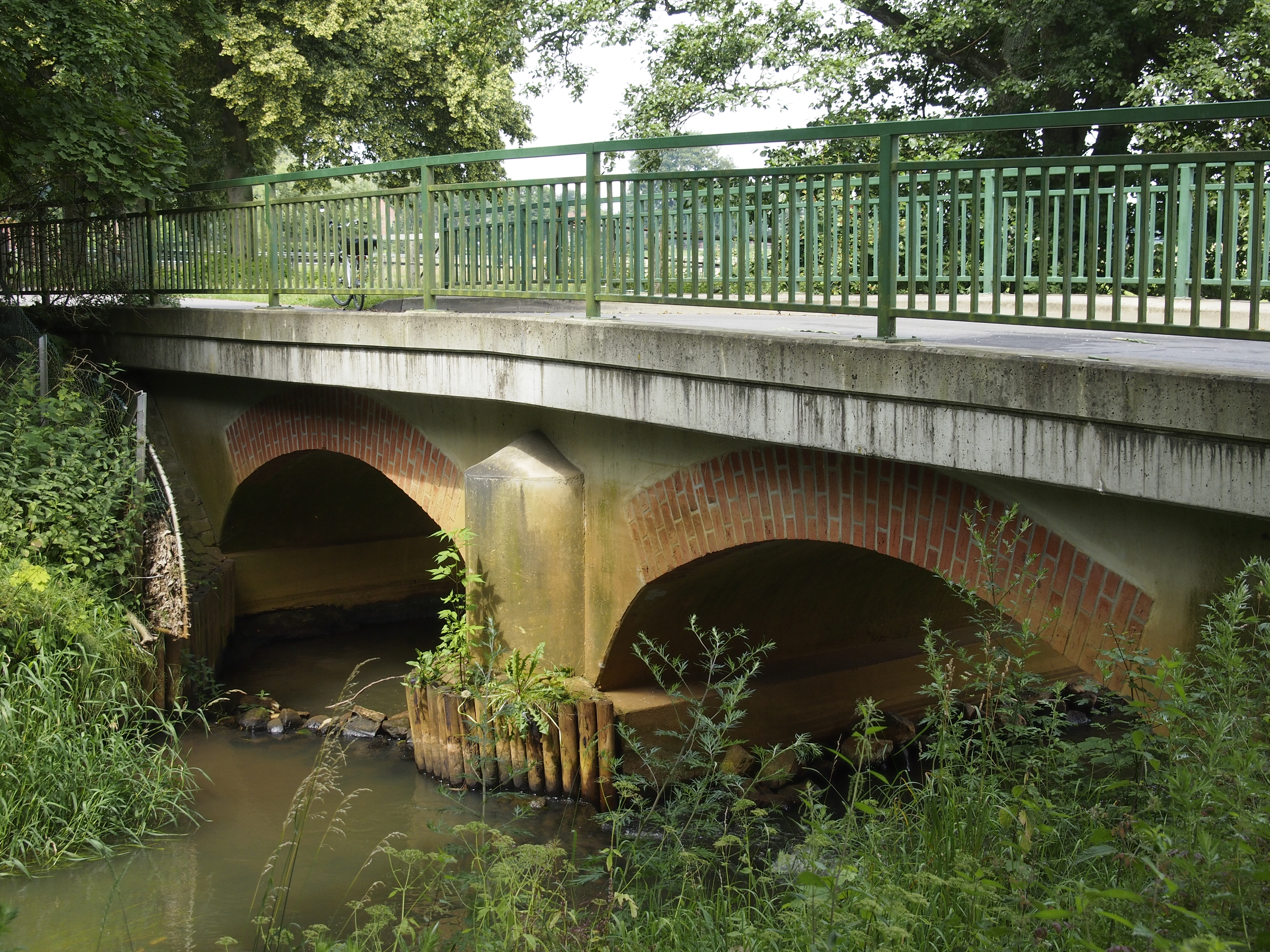 Rundbogenbrücke (ursprünglich 1795) bei Hambühren über den Aller-Fuhsekanal